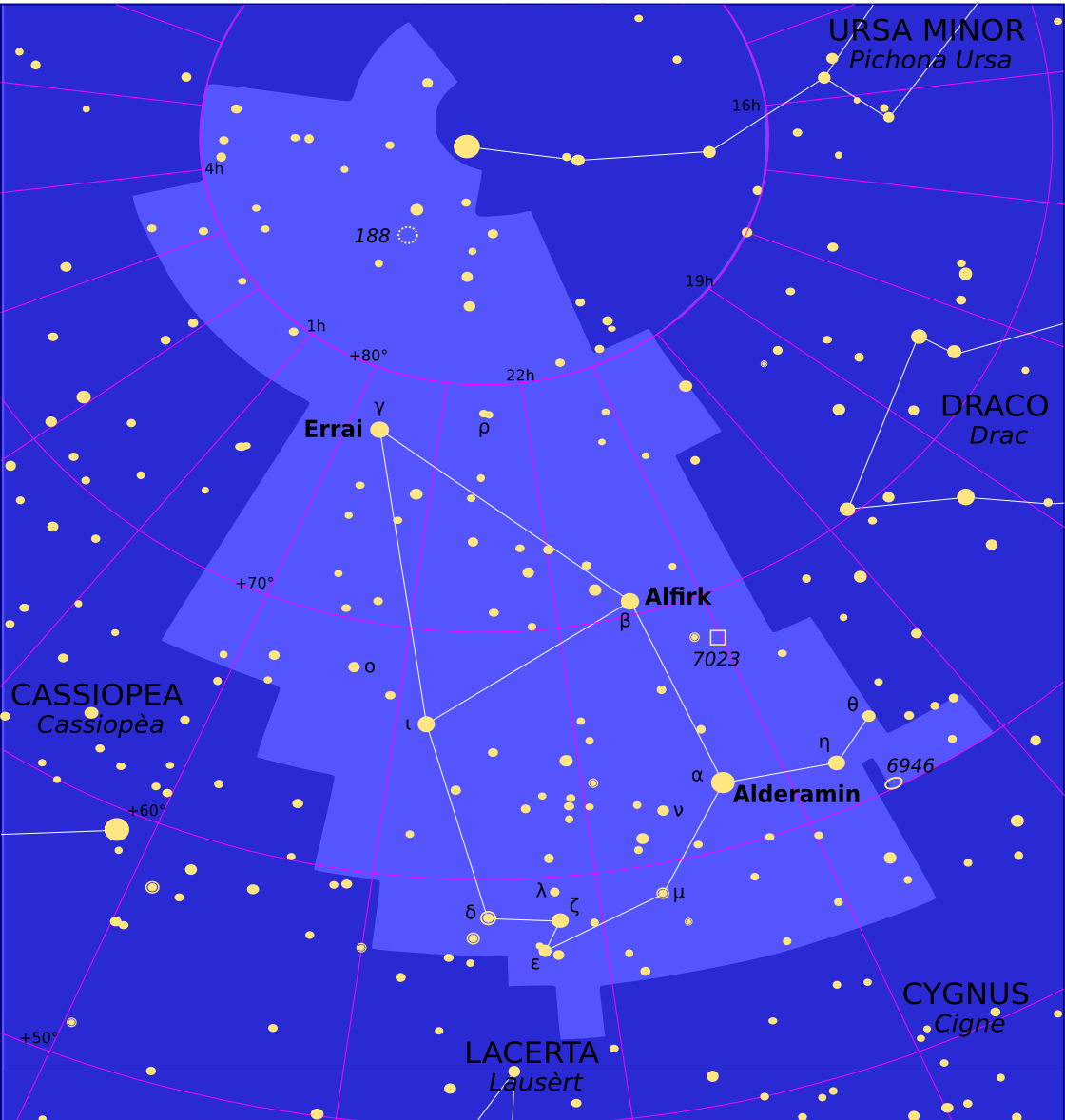 Representacion de la constellacion de Cefèa.